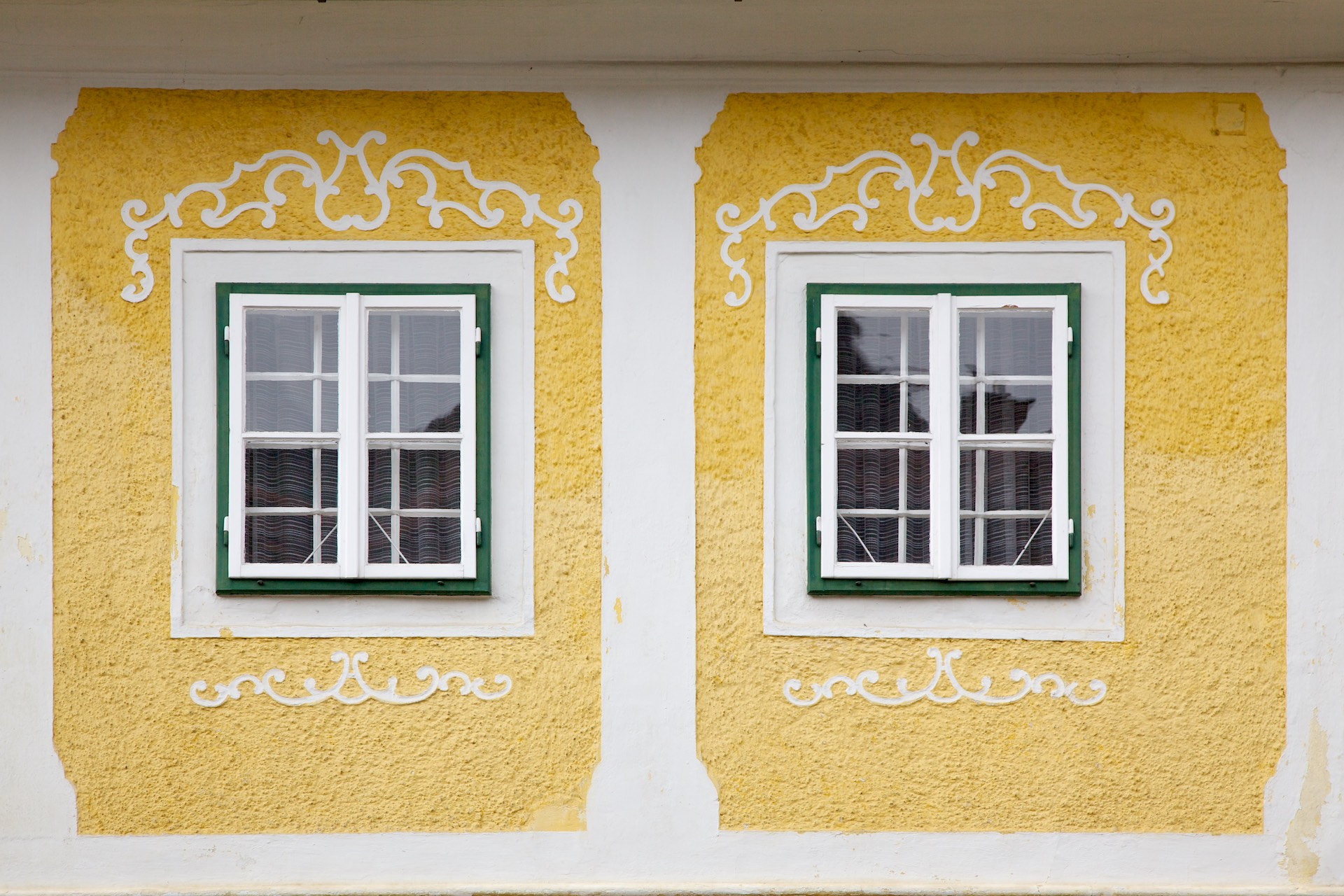 Schmiedhaus der ehemaligen Sensenschmiede an der Zinne, Micheldorf. Fassadendetail